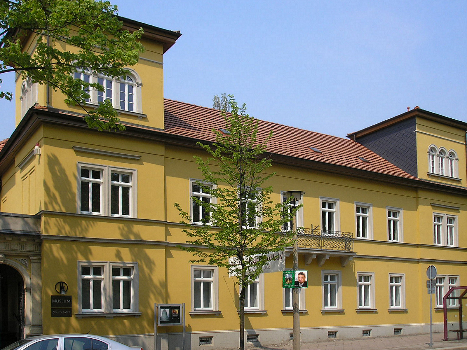 Museum der Stadt Apolda (Thüringen).